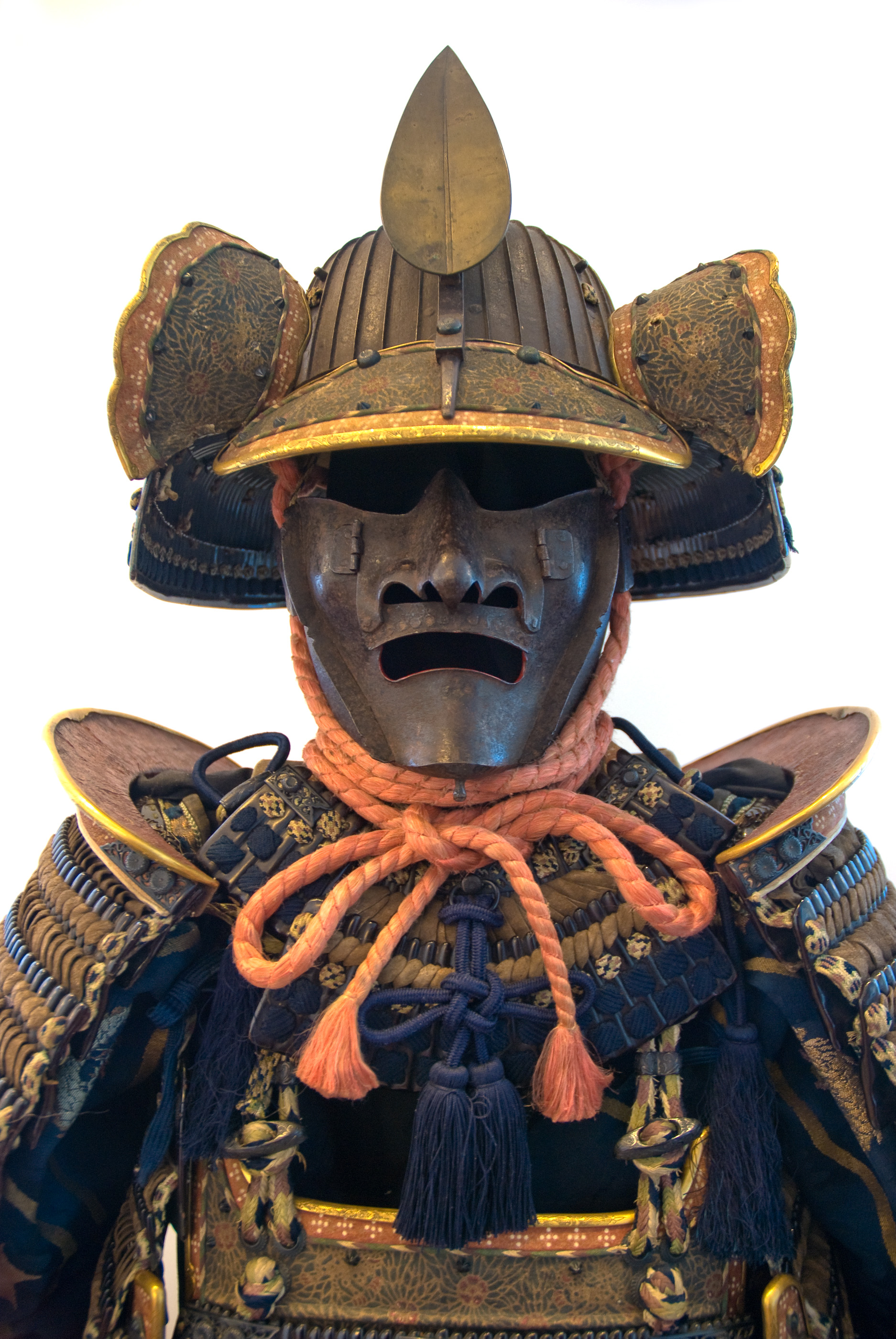 Partie supérieure d'une armure de samouraï, exposée au musée Guimet.